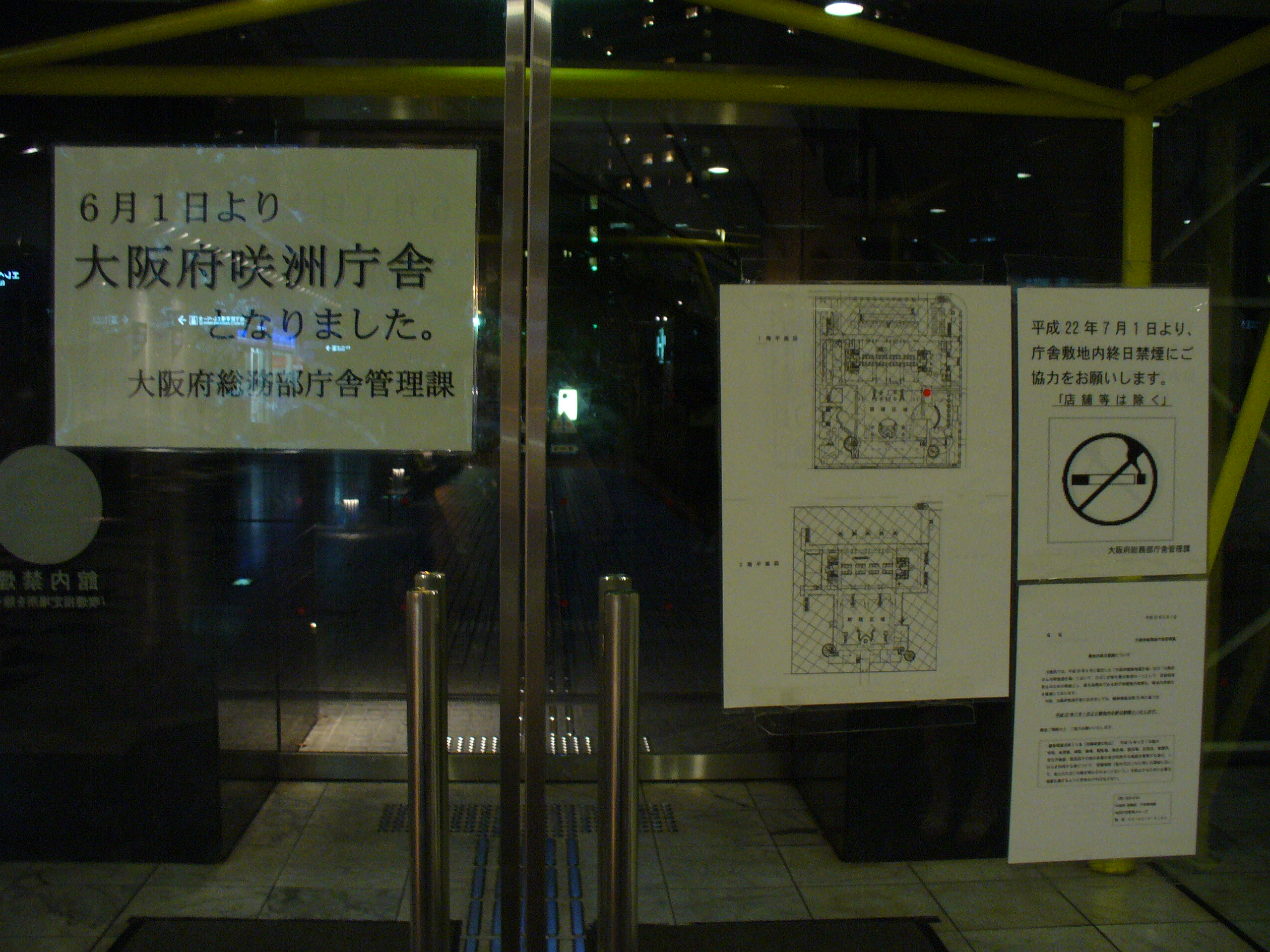 「大阪ワールドトレードセンタービル」の名称が「大阪府咲洲庁舎」へ変更となった旨の、出入り口扉への告知。